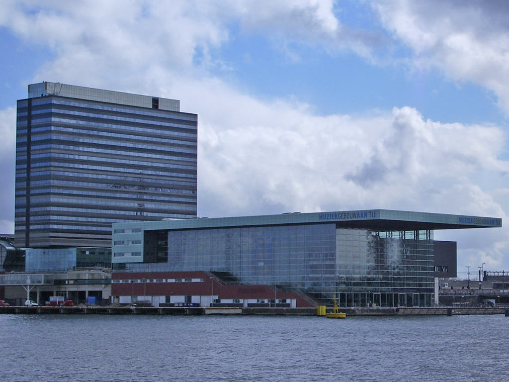 Het Muziekgebouw aan 't IJ in Amsterdam. Eigen foto, april 2006.